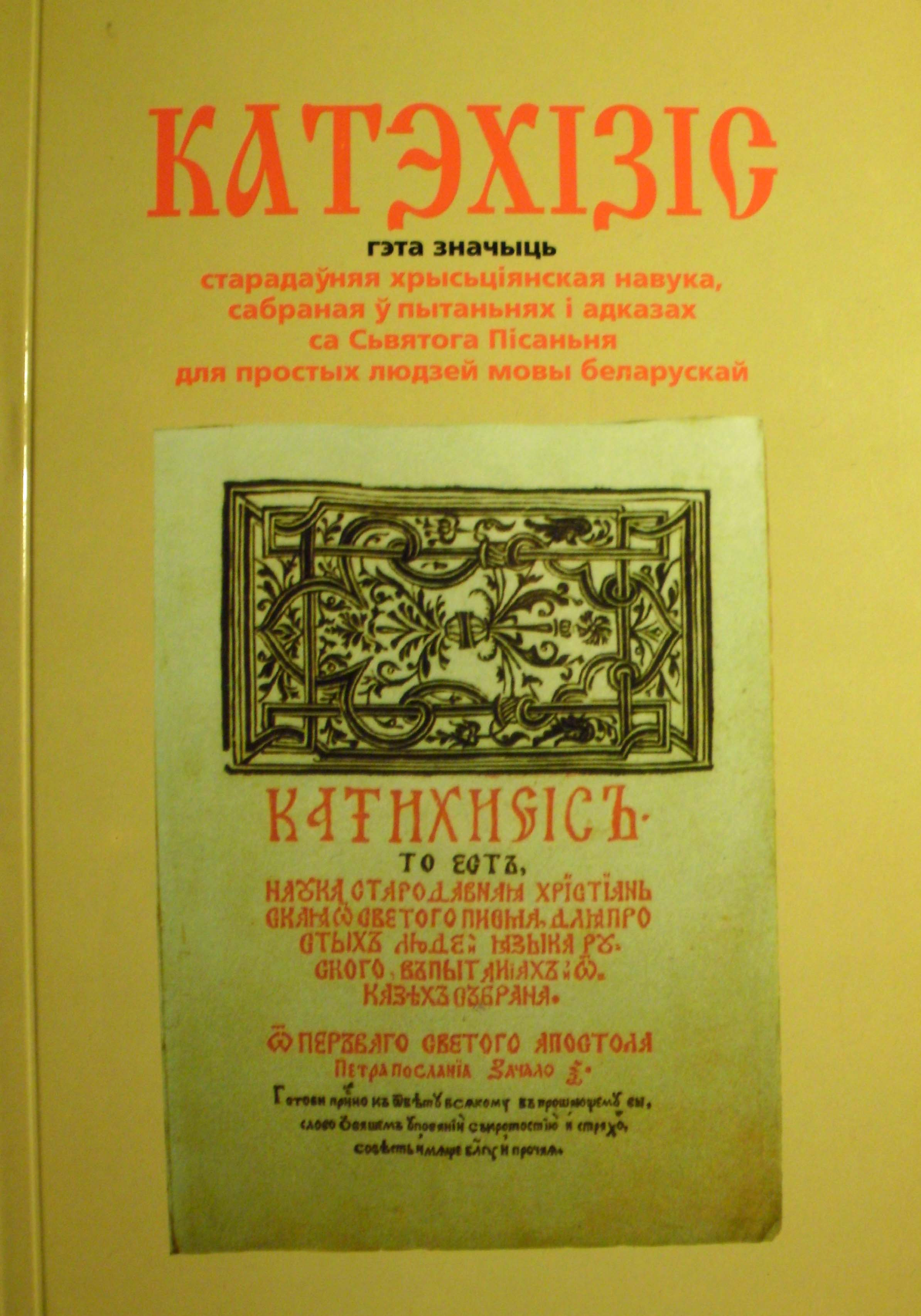 Беларуская (тарашкевіца): Катэхізіс Сымона Буднага, перавыданне 2005